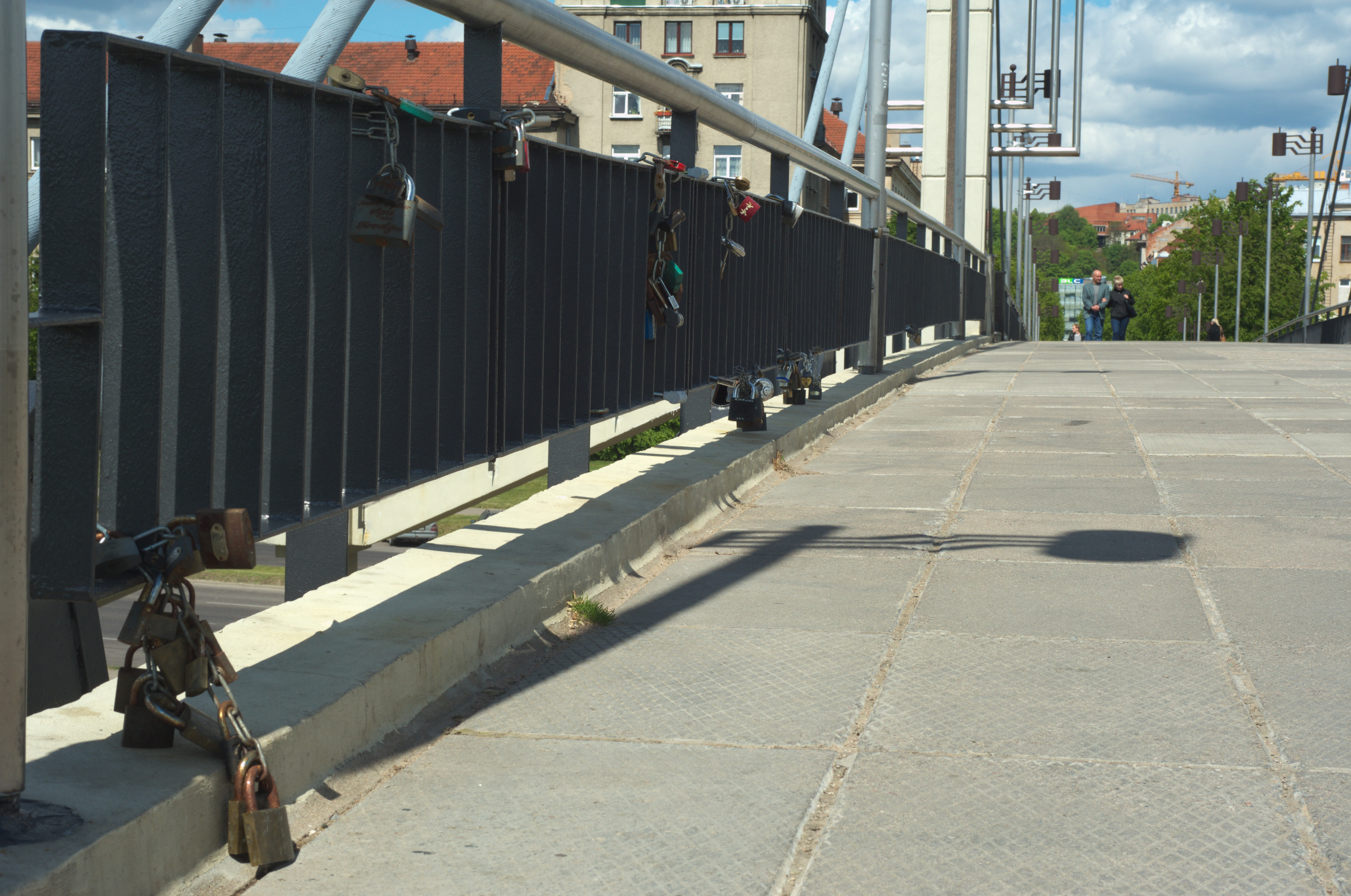 Tying up love on the bridge in Kaunas, Lithuania. Photo by Milan Fujda.